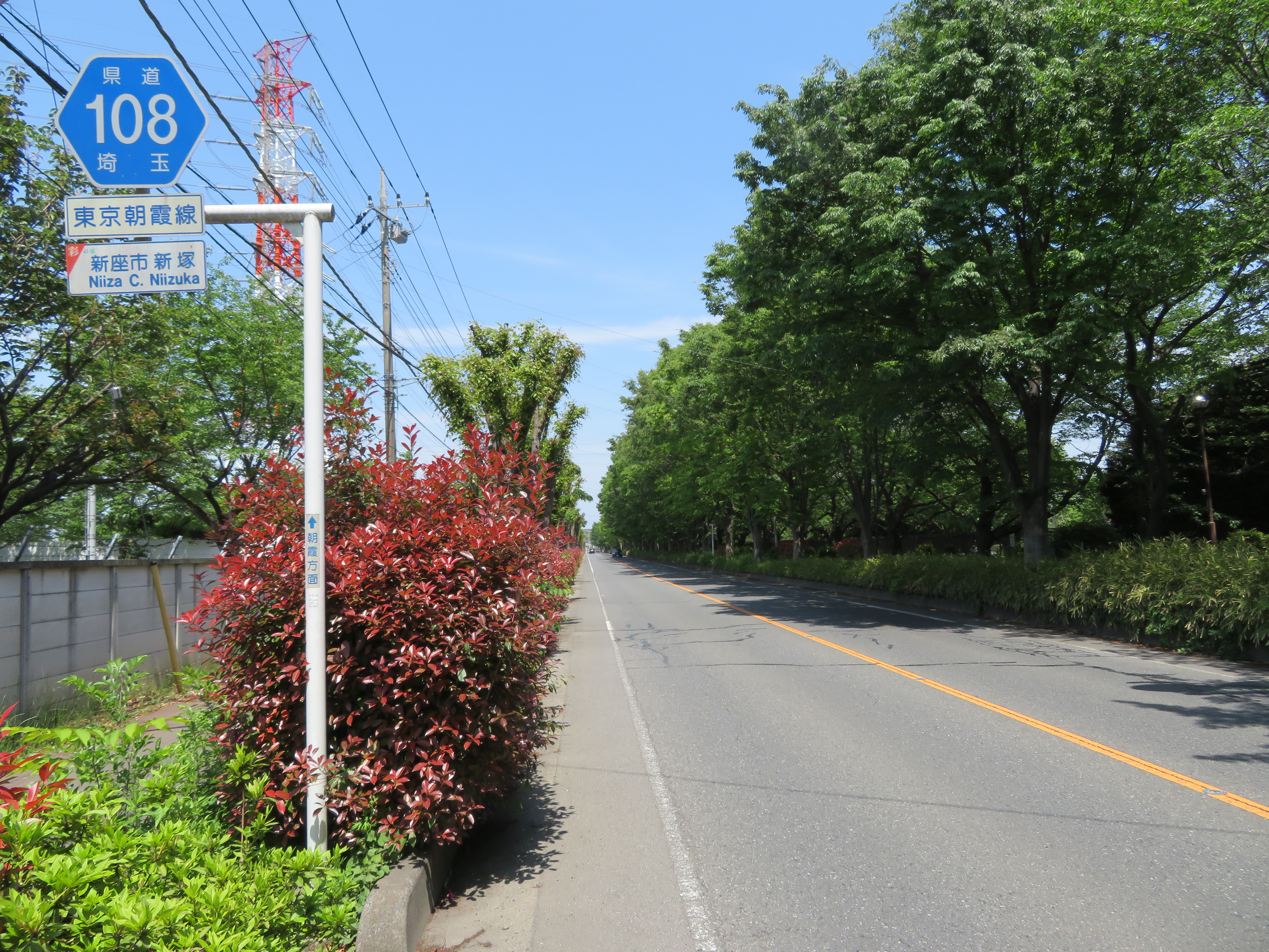 埼玉県道108号線新座市新塚付近（朝霞方面を撮影） Canon PowerShot SX720 HS